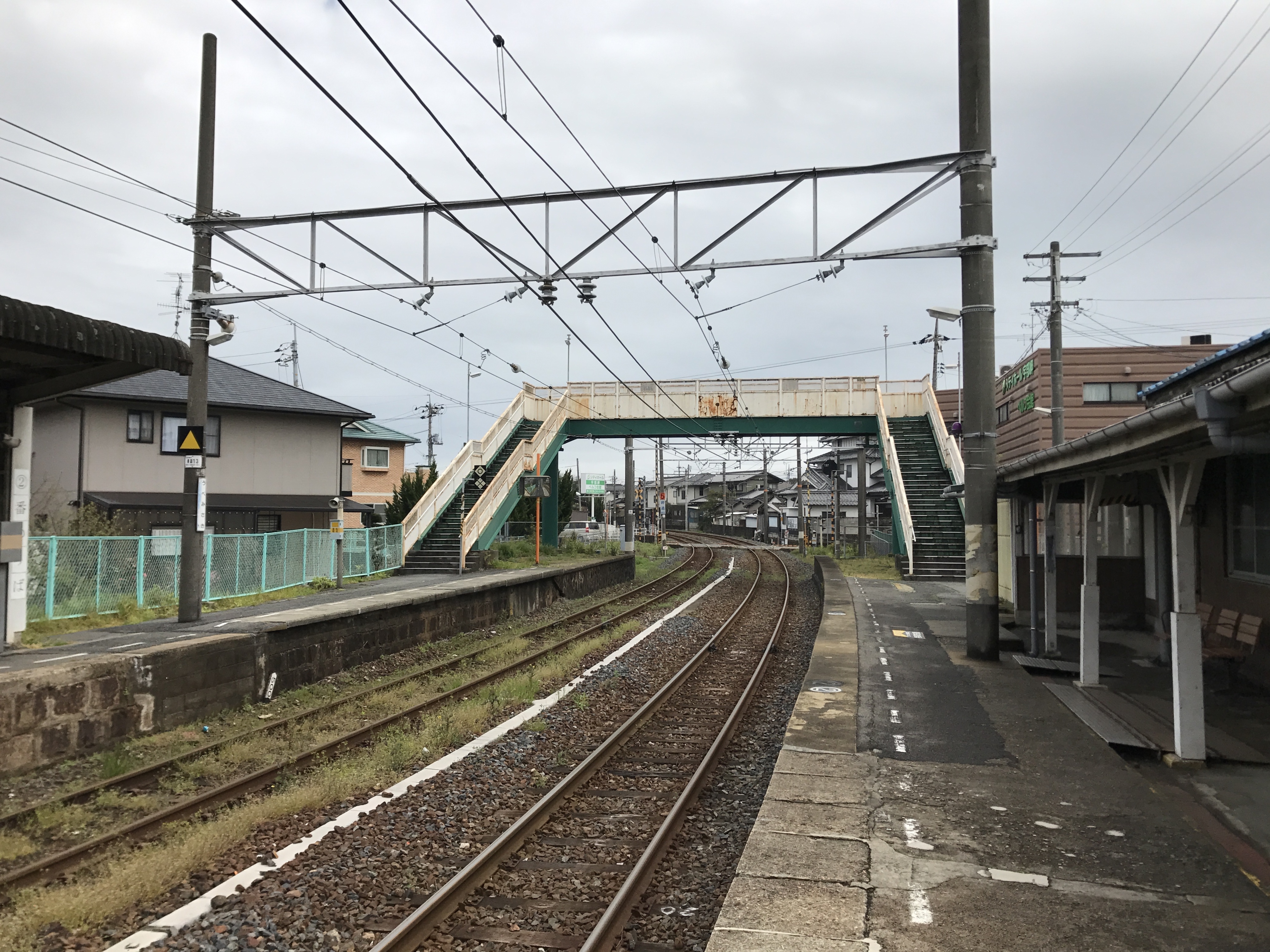 宇部岬駅のホーム(奥は草江方面)